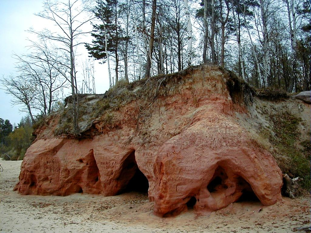 Ķurmraga apkārtne, alas Vidzemes jūrmalā 2000-10-21